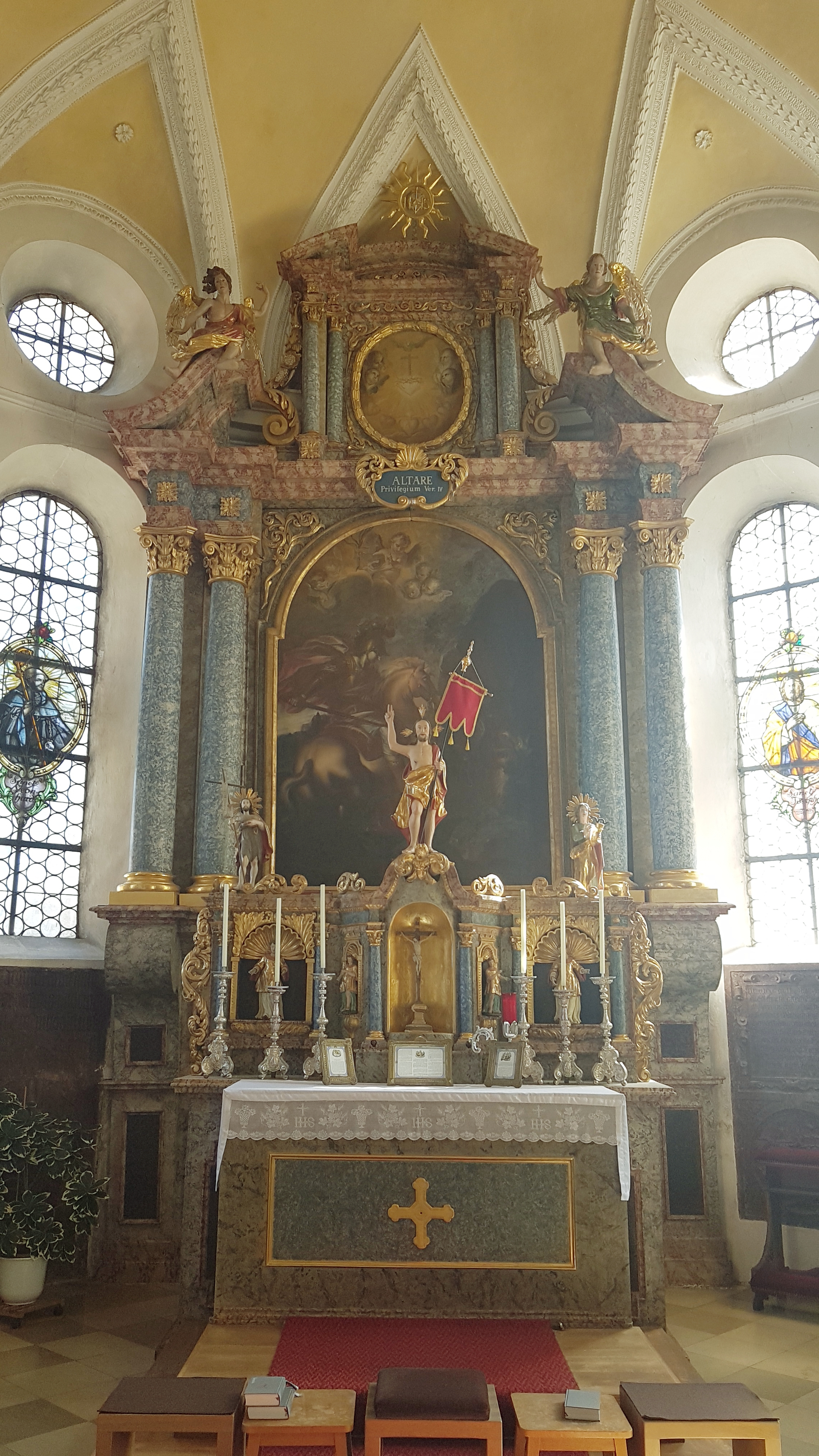 St. Georg (Pöring), Hochaltar